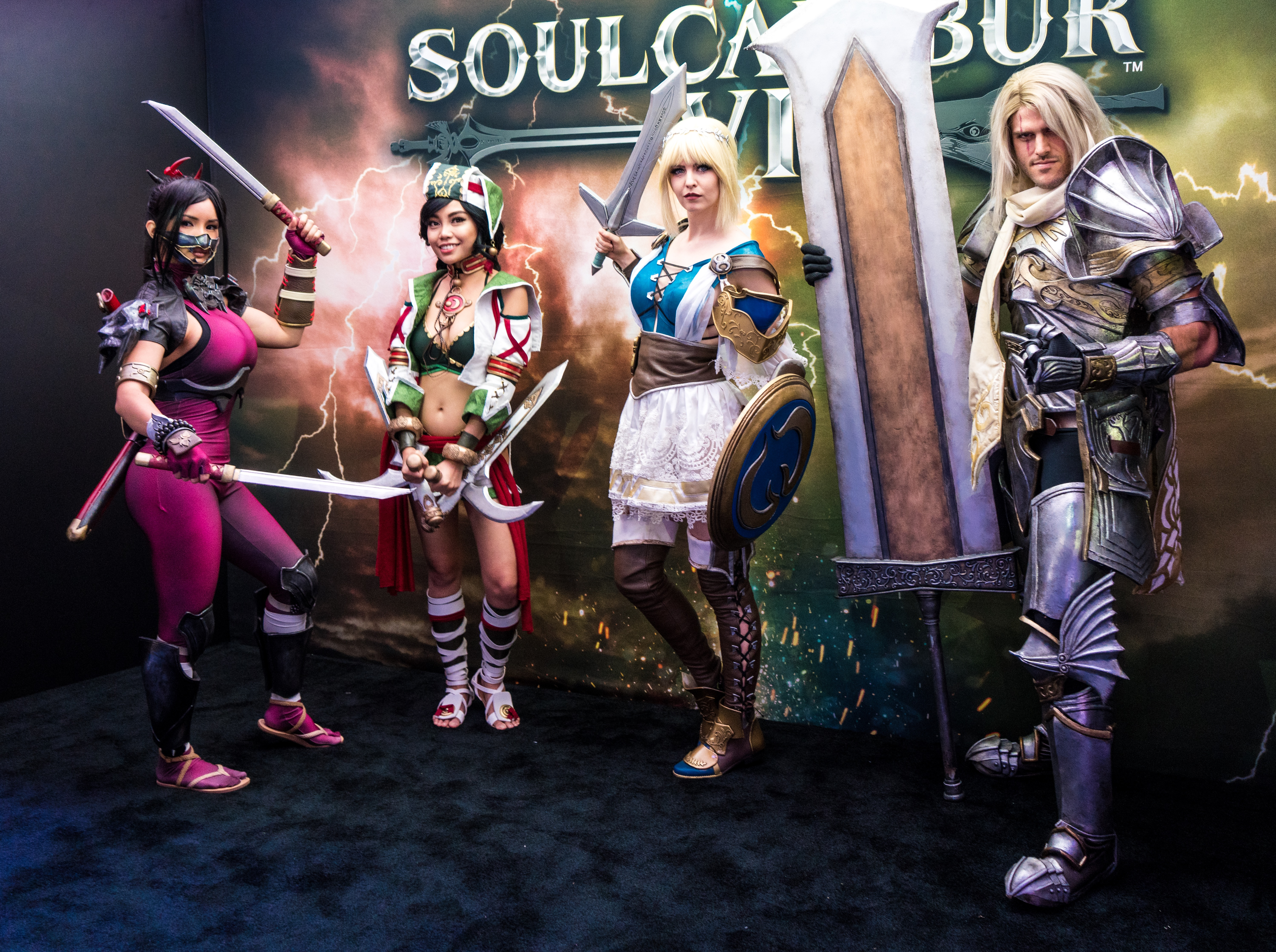 PAX West 2018